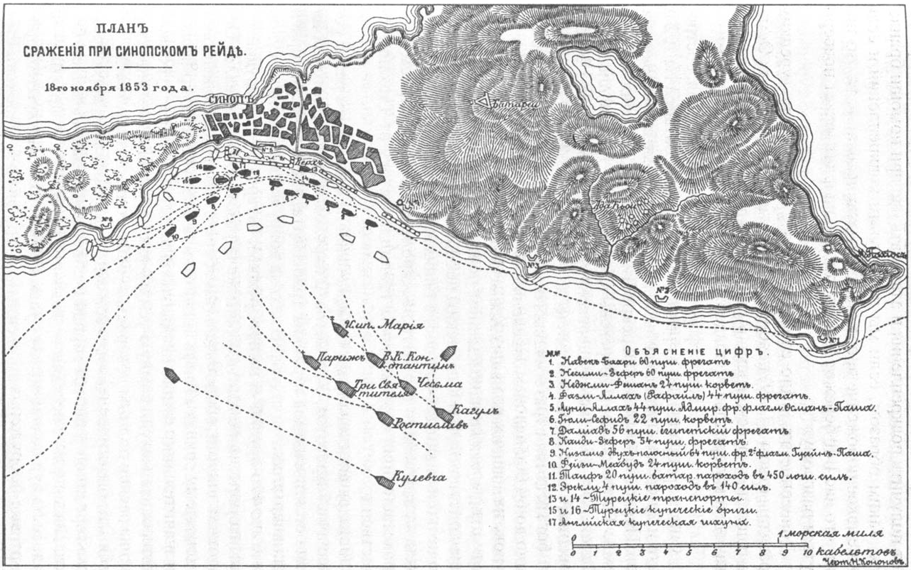 План Синопского сражения из сочинений А. М. Зайончковского